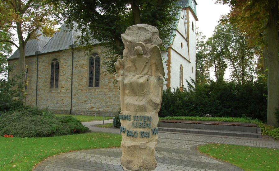 St. Jakobus Kirche in Mastholte, Rietberg, Germany mit Kriegerdenkmal auf dem Vorplatz